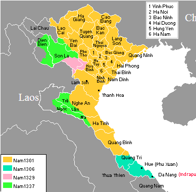 Lãnh thổ Việt Nam thời nhà Nguyễn (1802-1945).